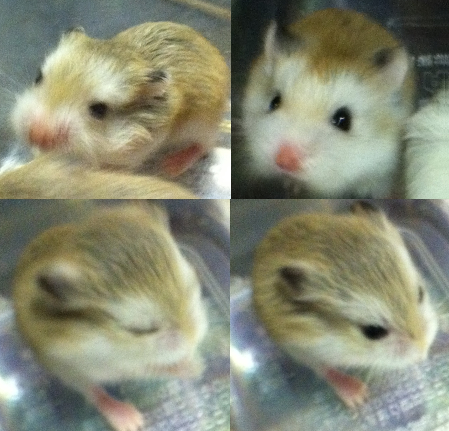 ロボロフスキーハムスター